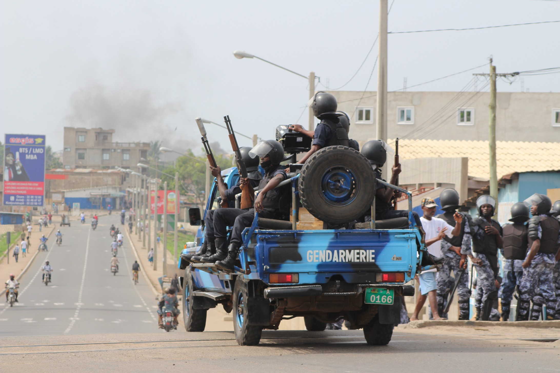 La police en vadrouille dans les rues de Lomé, au Togo, le 18 octobre 2017. (VOA/Kayi Lawson)